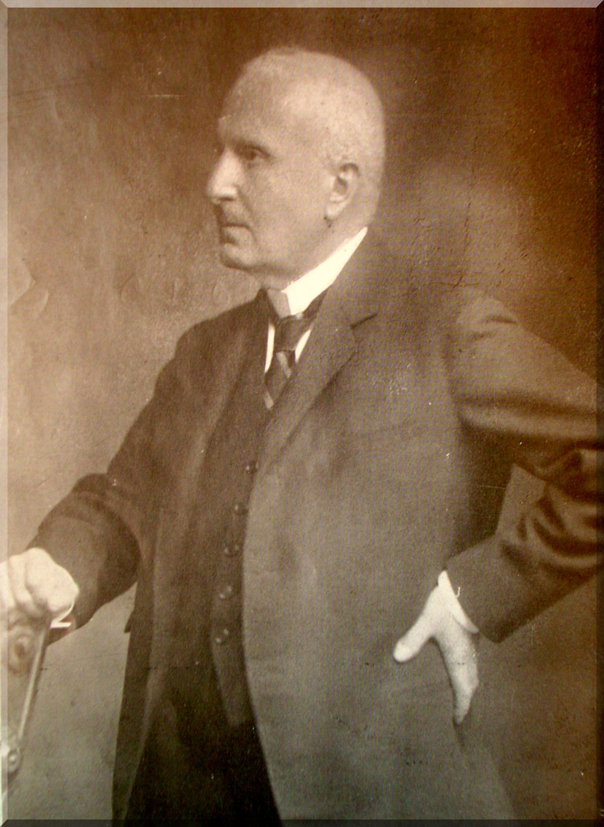 Degen Árpád (1866-1934) mellképe a Botanikai Lapok 1936. évi különlenyomatából. (Saját scannelés). Fotós ismeretlen.